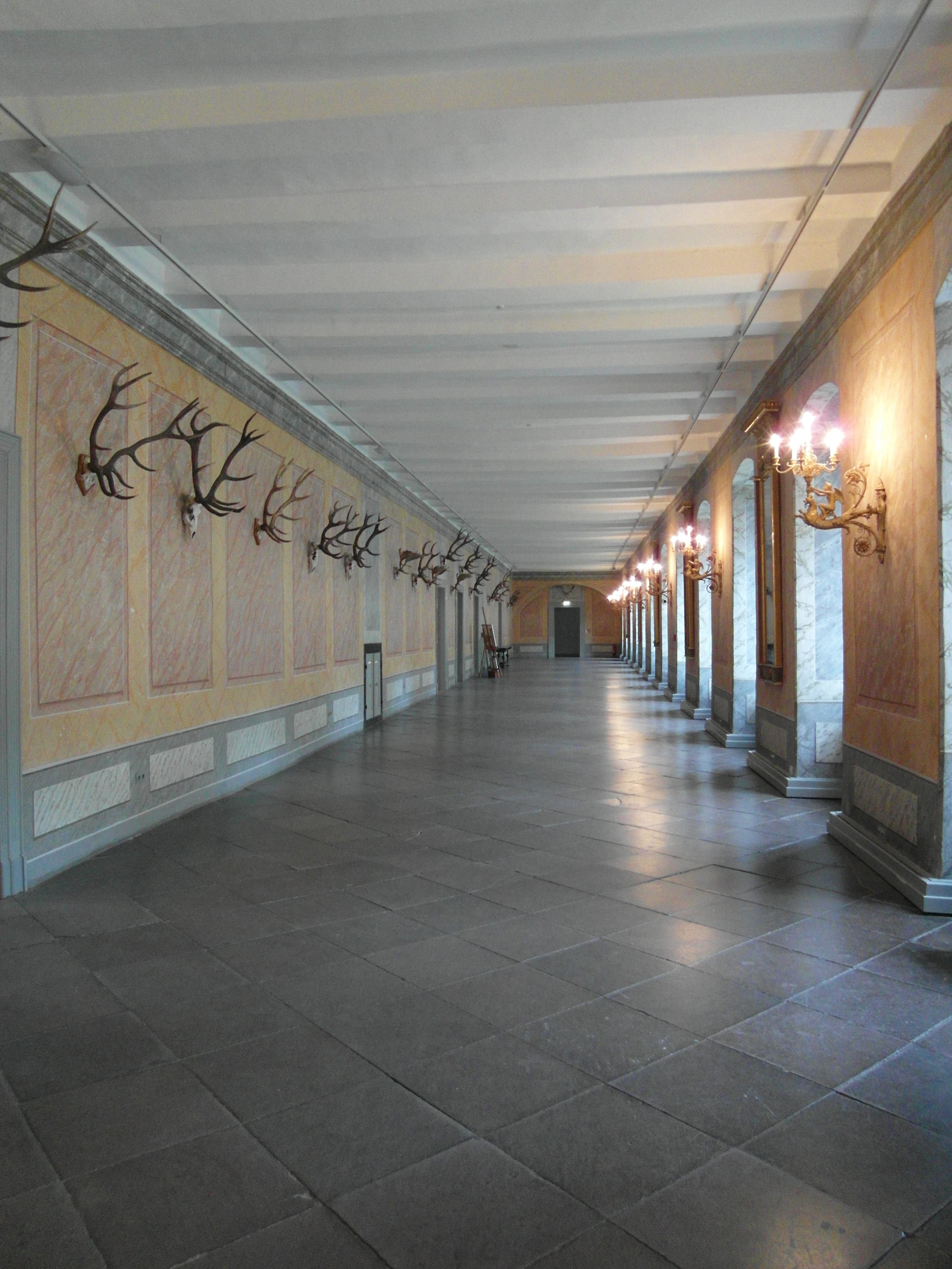 Der Geweihgang, Verbindungsgang zwischen Ost- und Westflügel in Schloß Corvey bei Höxter